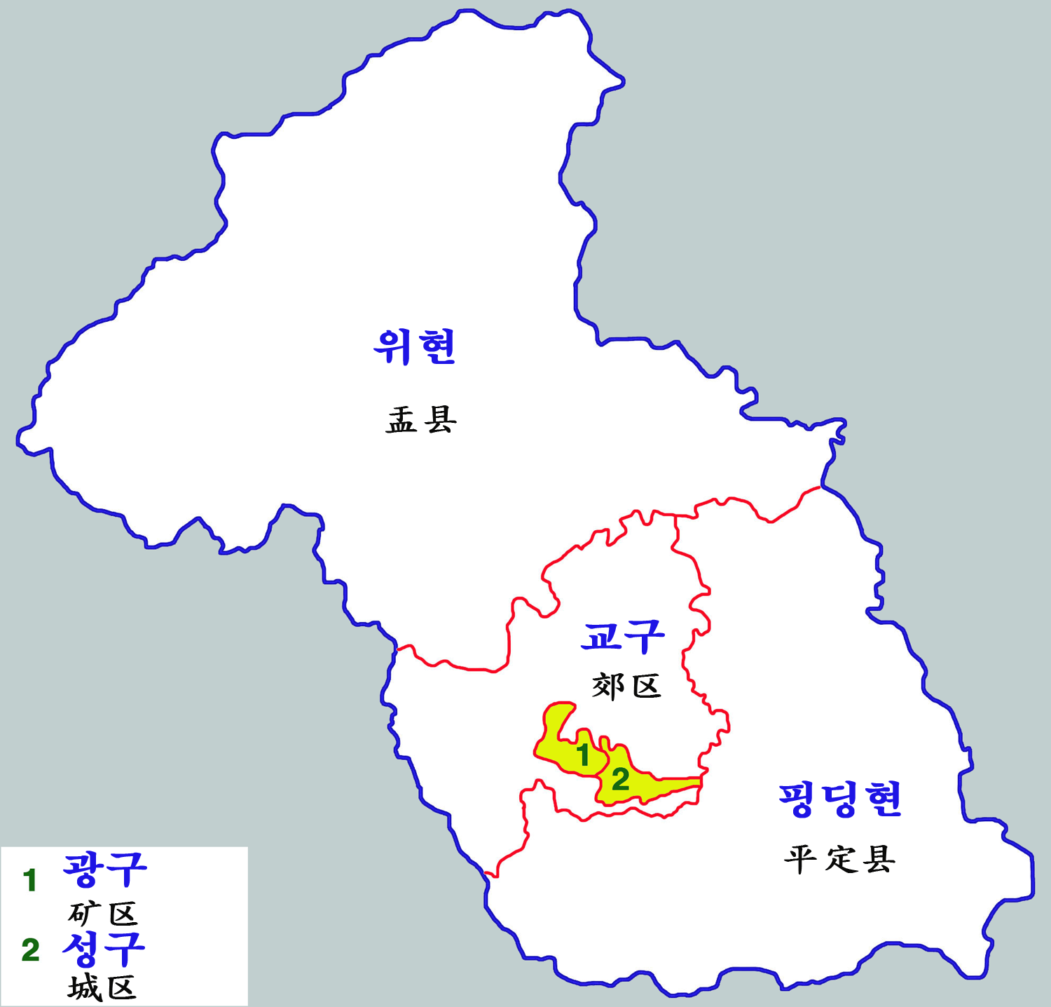 양취안시 현급구역도